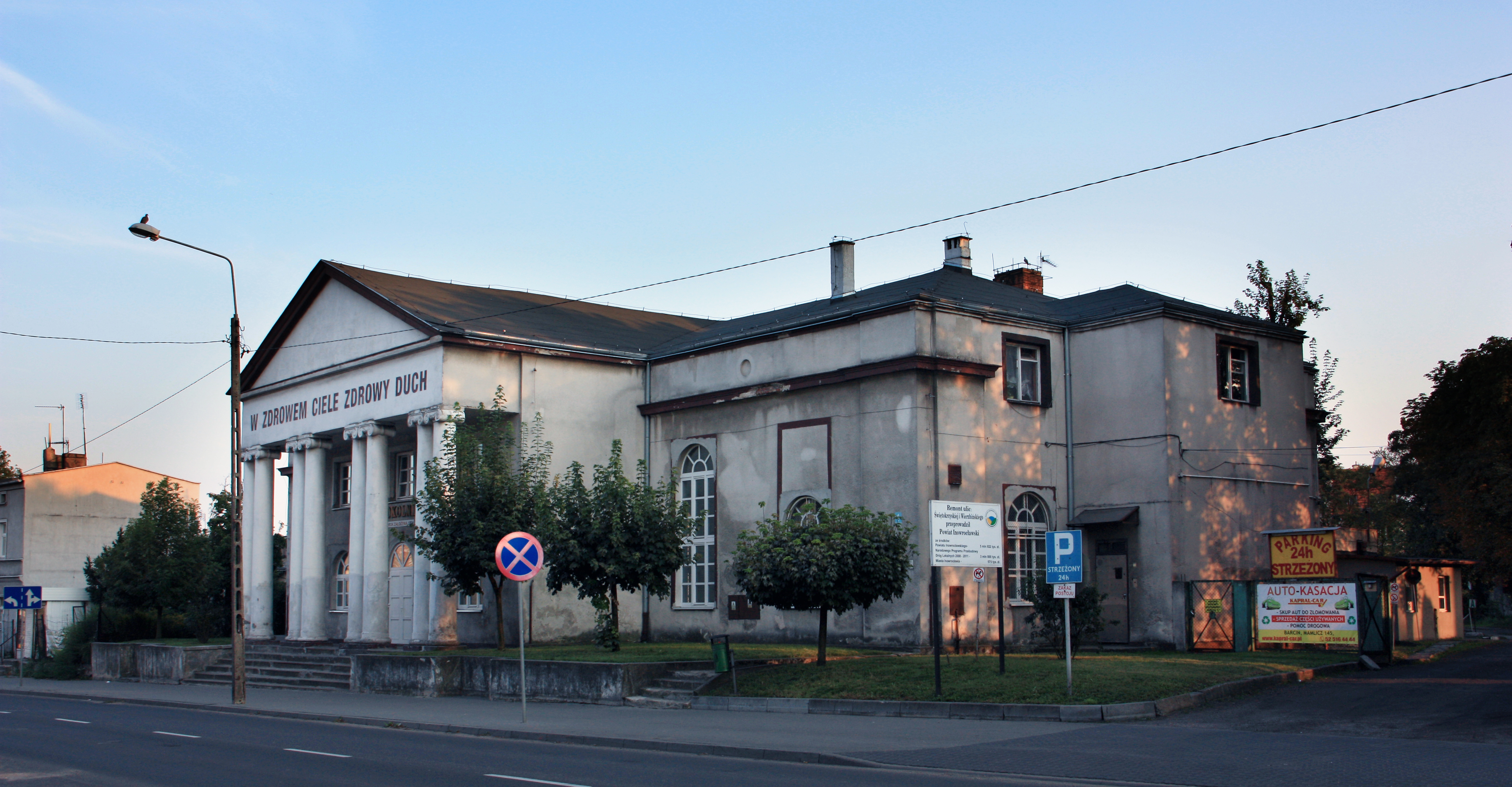 Inowrocław, ul. Szymborska 4 - Sokolnia - budynek Towarzystwa Gimnastycznego „Sokół”